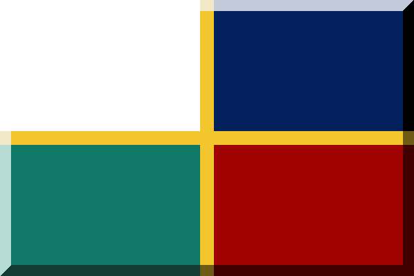 Four colour Lions-like flag